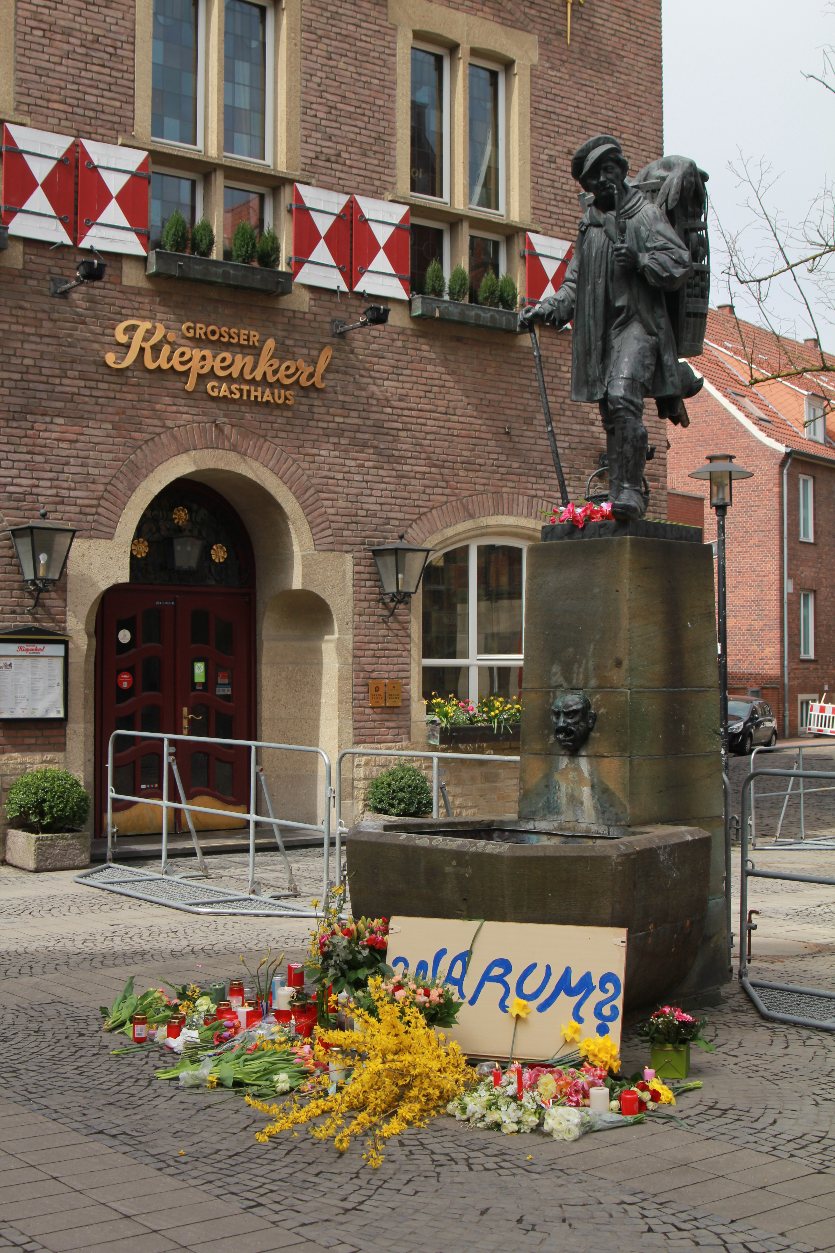 Das Kiepenkerl-Denkmal in Münster am 8. April 2018, knapp 24 Stunden nachdem am Vortag ein VW-Bus in die Außenterasse des Restaurants "Kiepenkerl" fuhr und dabei mehrere Menschen starben.